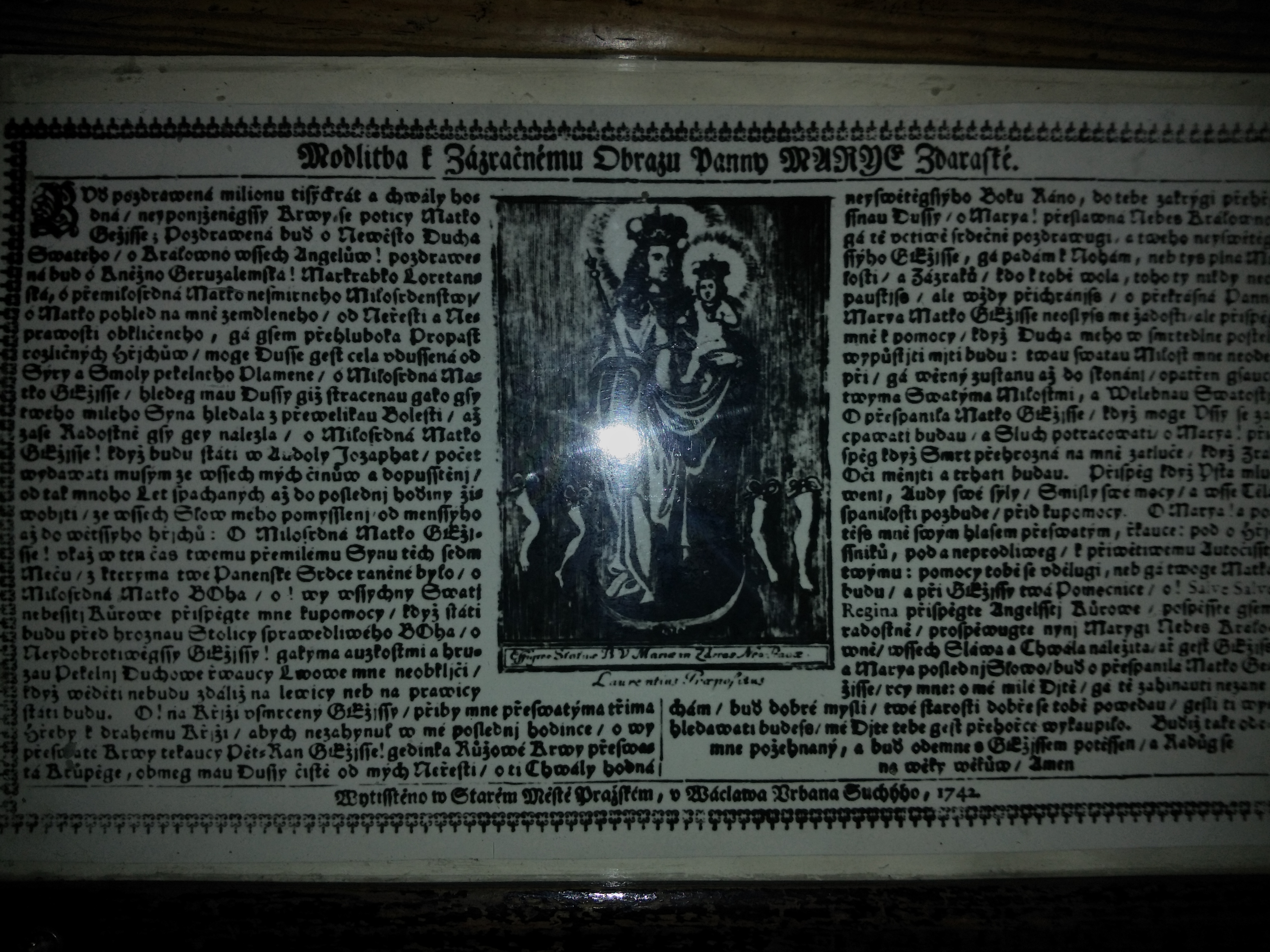 Zvlášní modlitba k Panně Marii Zderazské vytištěná roku 1742, od Václava Suchého